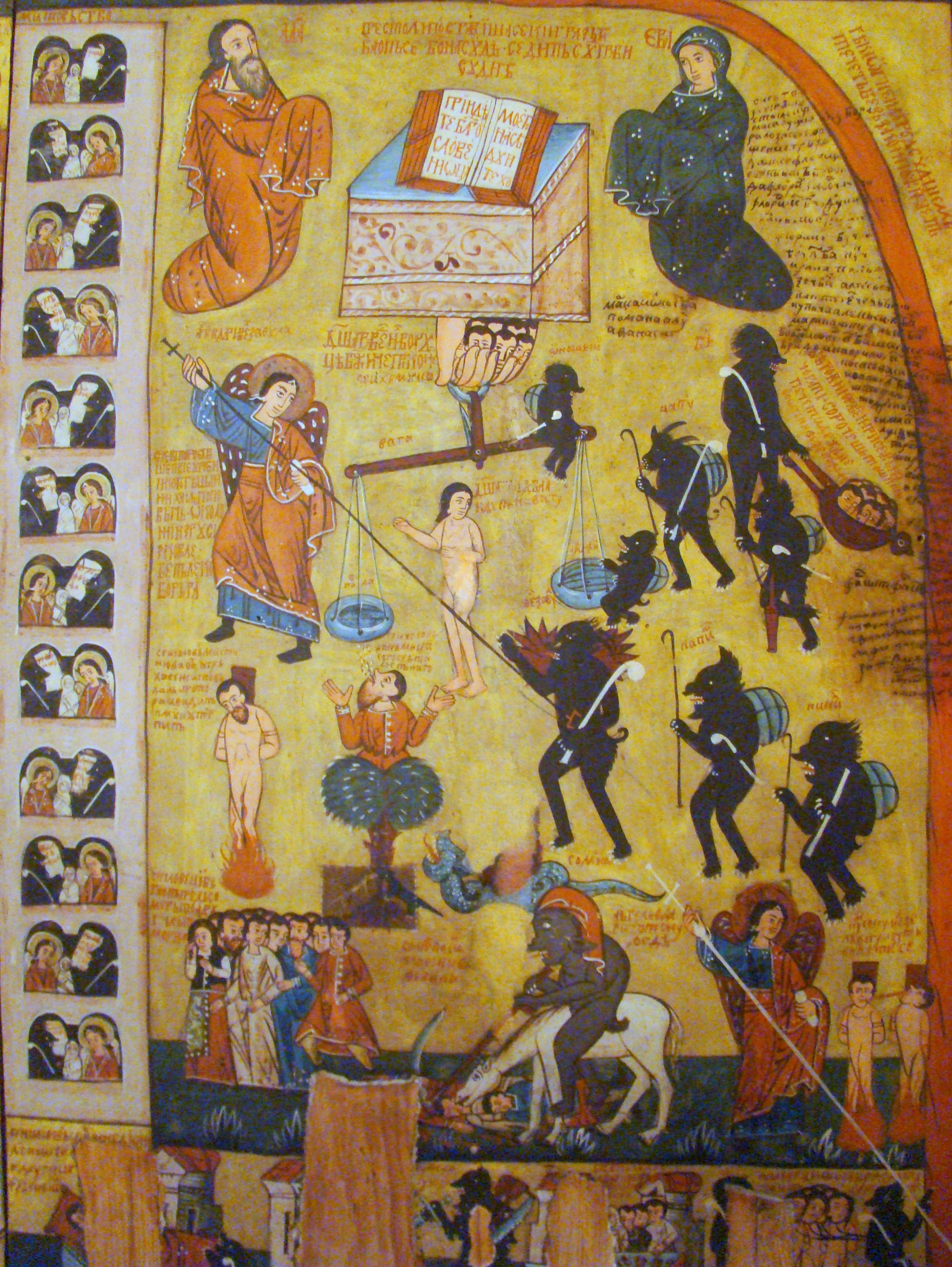 Biserica de lemn din Budești-Josani, județul Maramureș